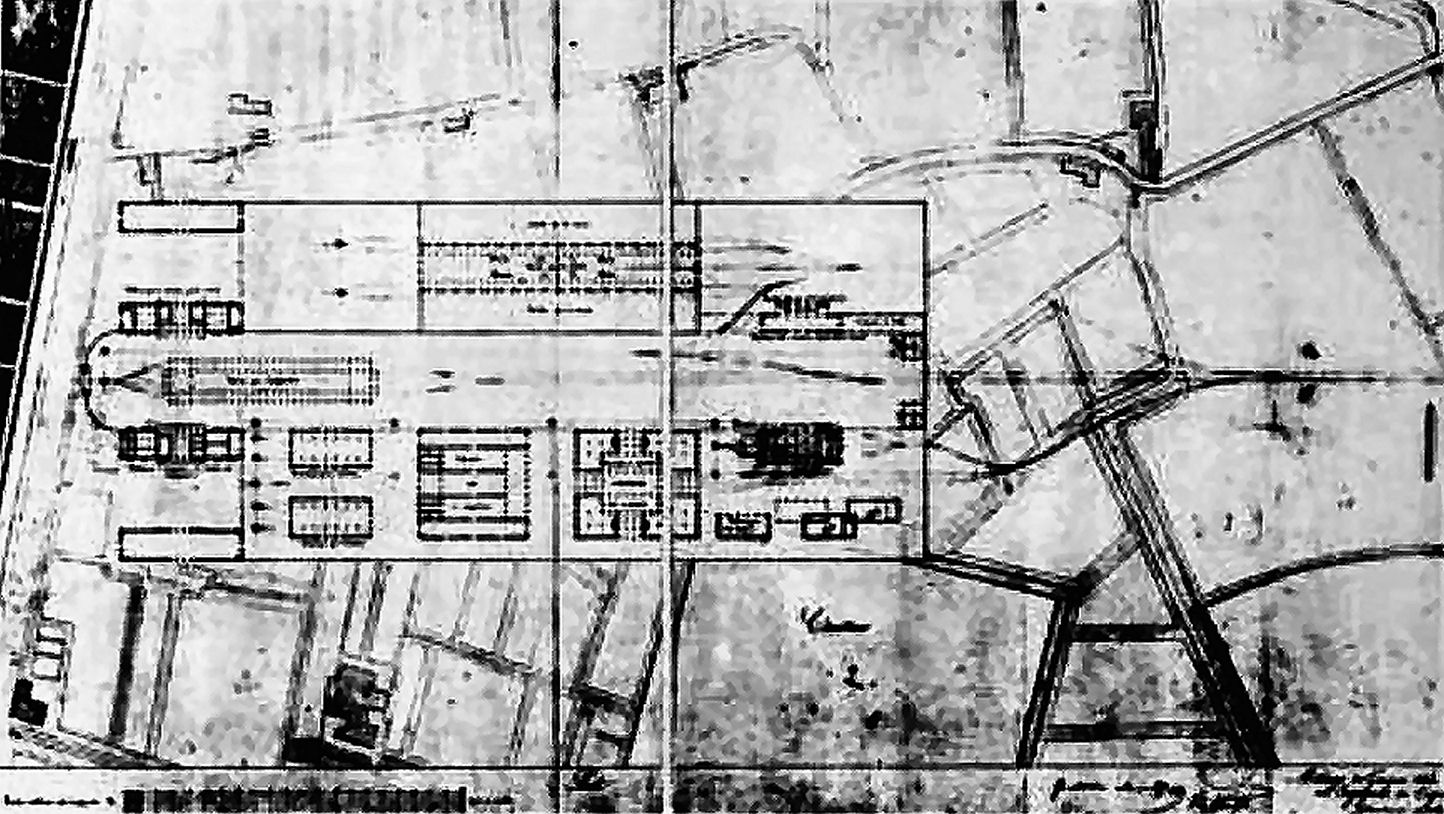 Horatius (leggero restauro) da progetto dell'ingegnere Capo della Imperial Regia Privilegiata Strada ferrata Ferdinandea Lombardo-Veneta Giovanni Milani - 1843 Pianta della Stazione "provvisoria" di Milano Porta Tosa.